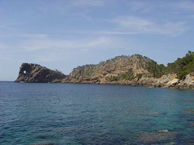 Na Foradada. Mallorca.